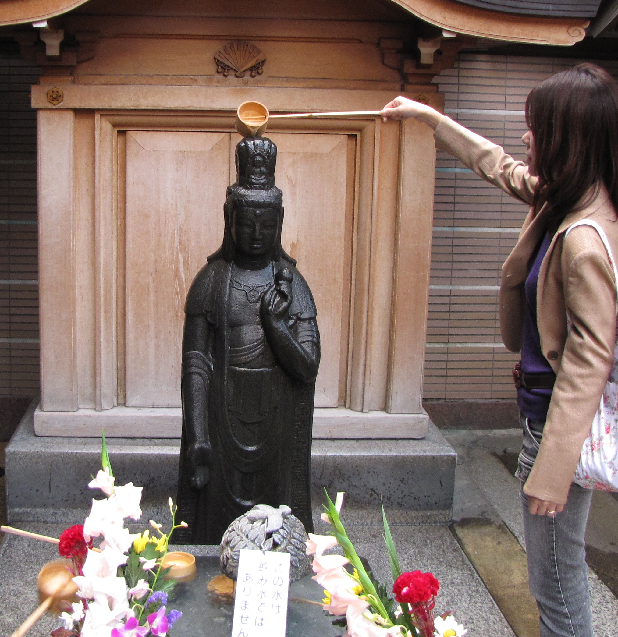 高岩寺（とげぬき地蔵）の洗い観音像。